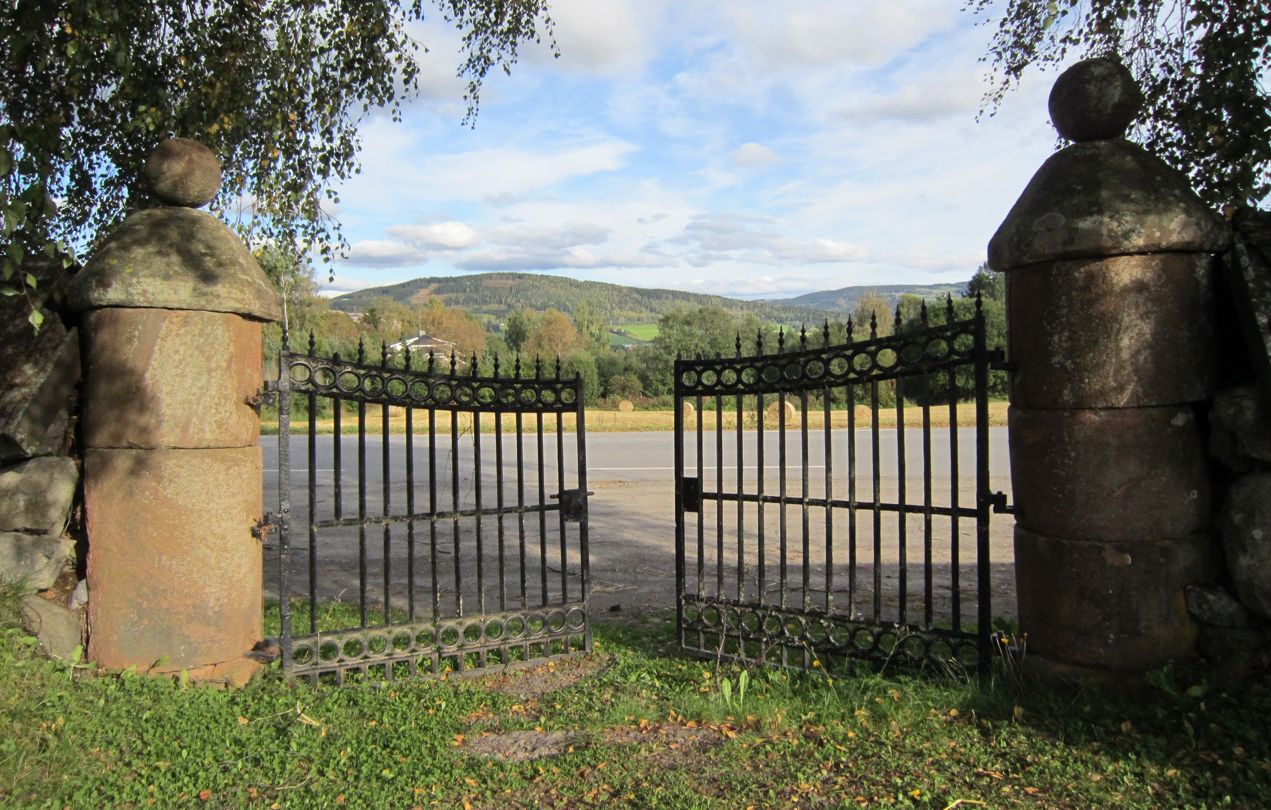 Fylkesvei 1684 forbi Veldre kirke